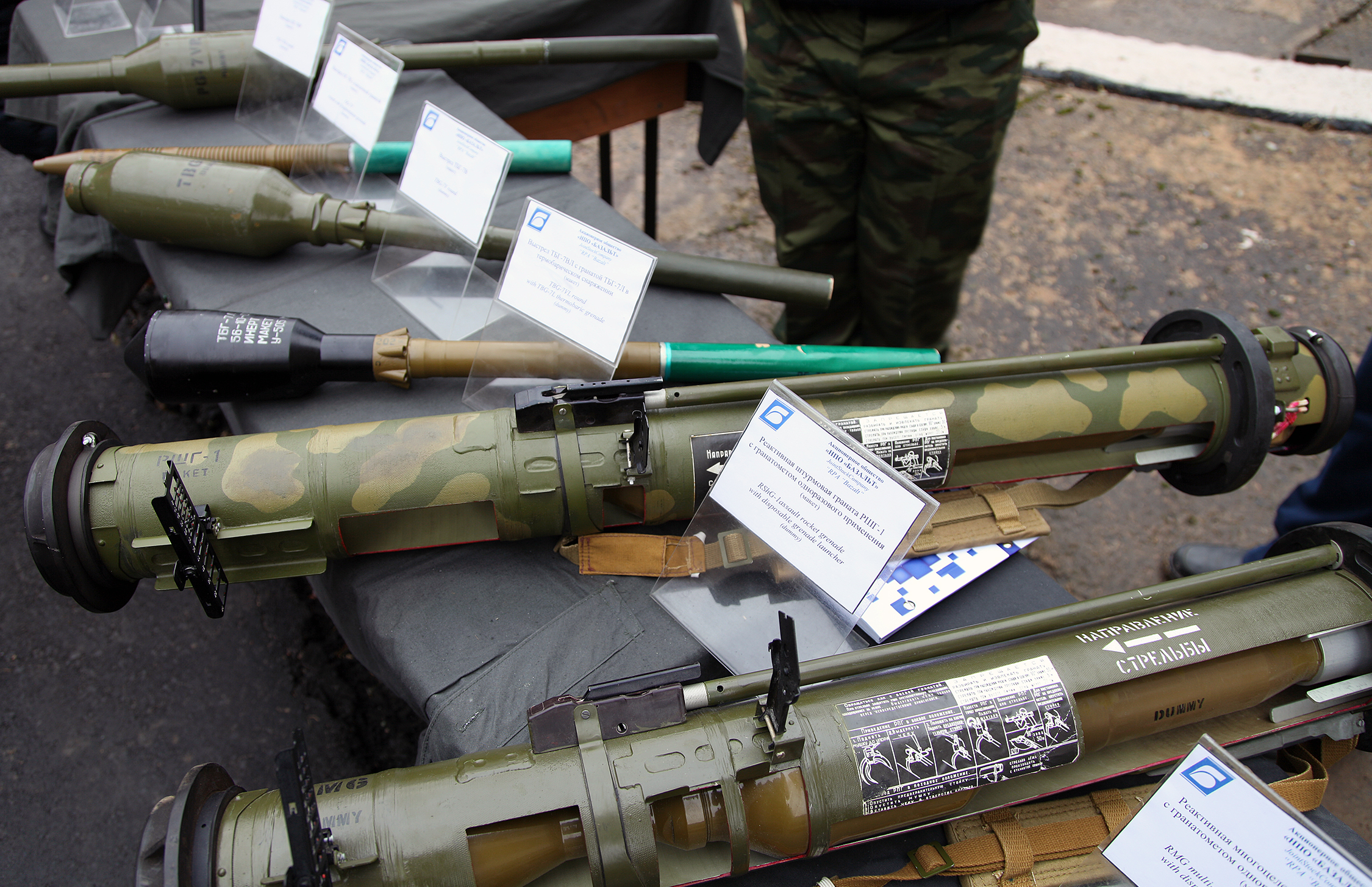 РШГ-1